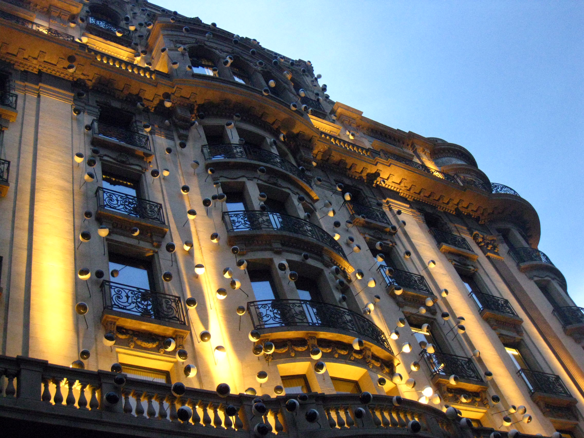 Globus oculars (Frederic Amat). Via Laietana, 49 (Barcelona)